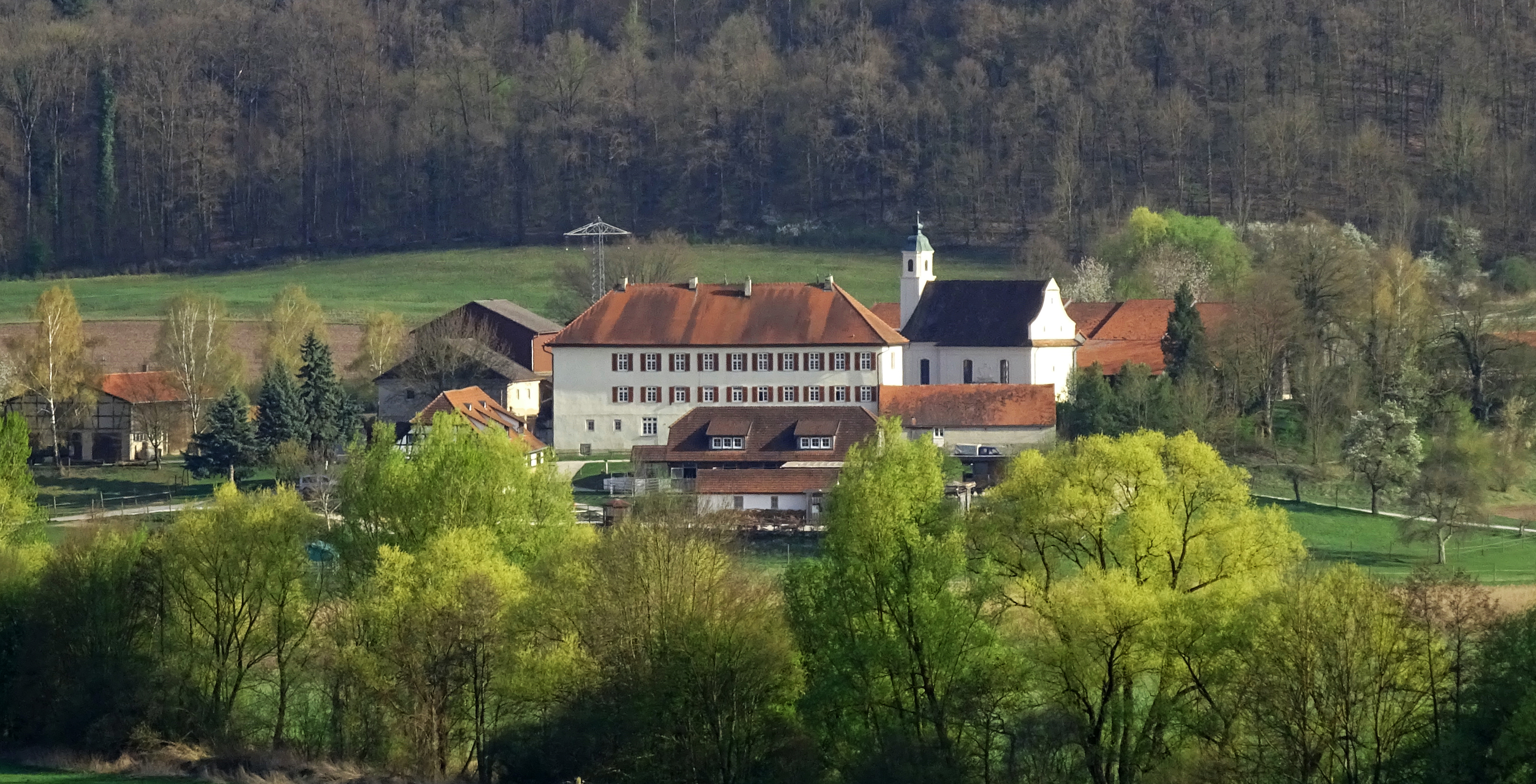 Domäne Ammern (Ammerhof) im Ammertal zwischen Tübingen und Unterjesingen, Blick von NNW